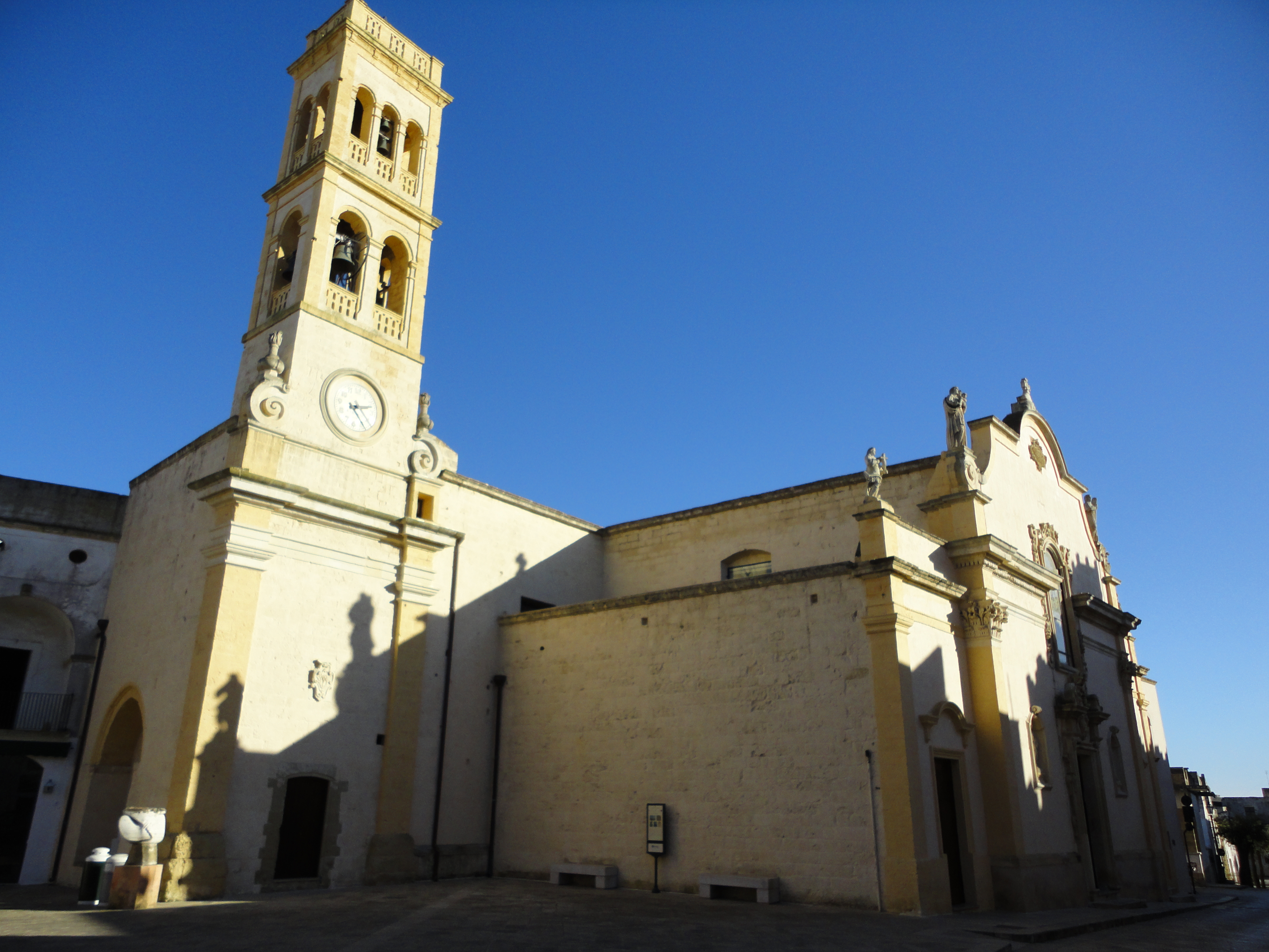 Chiesa Madre di Specchia Lecce